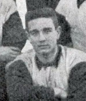 Georges Garnier en 1896, champion de France UFSFA (Club français).